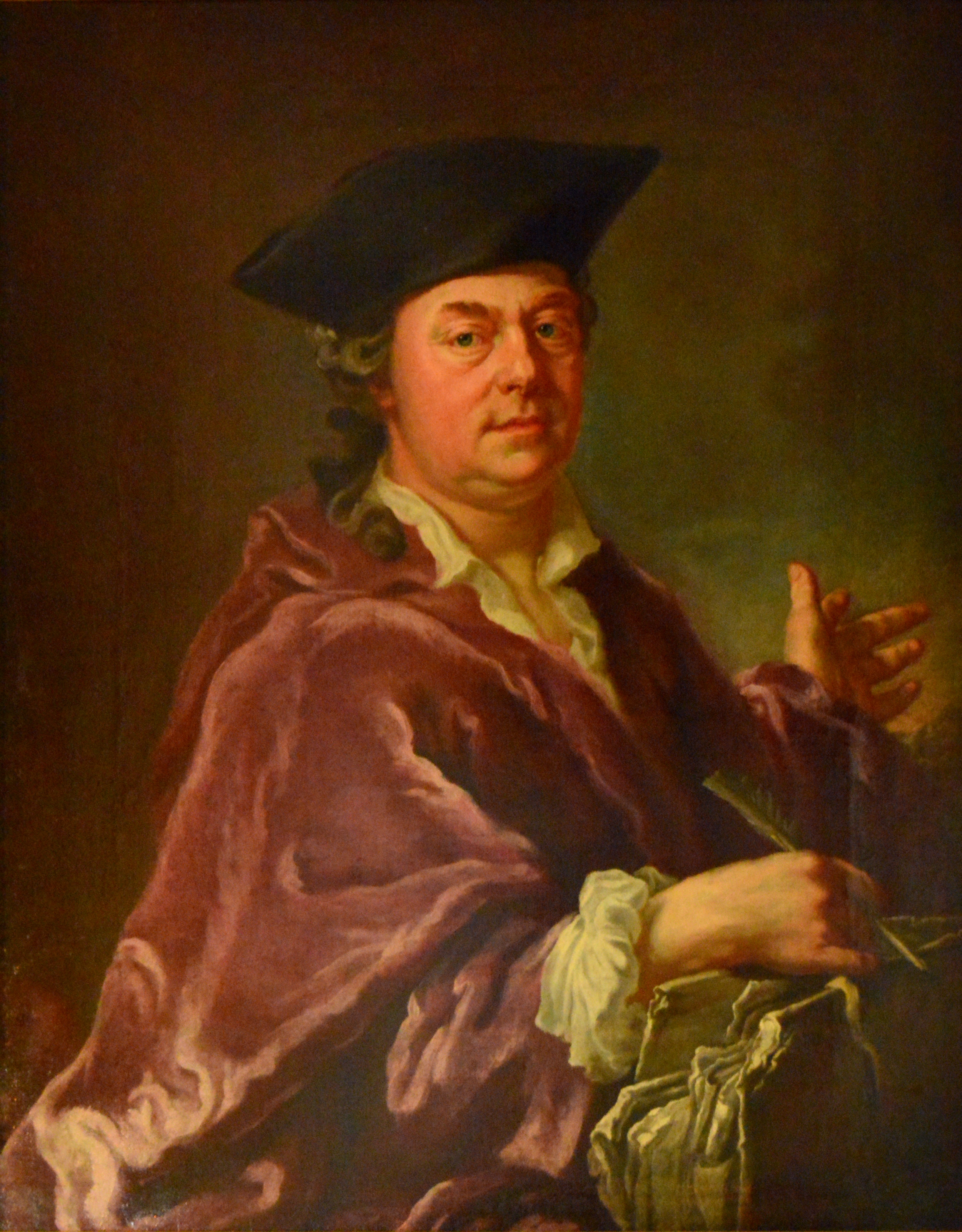 Self-portrait